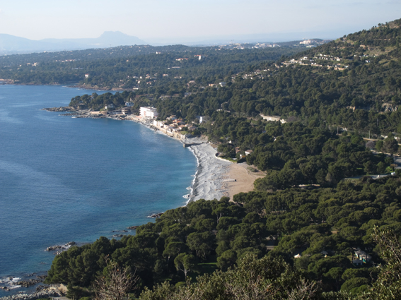 Le Dramont, France, Côte d'Azur. Plage du débarquement